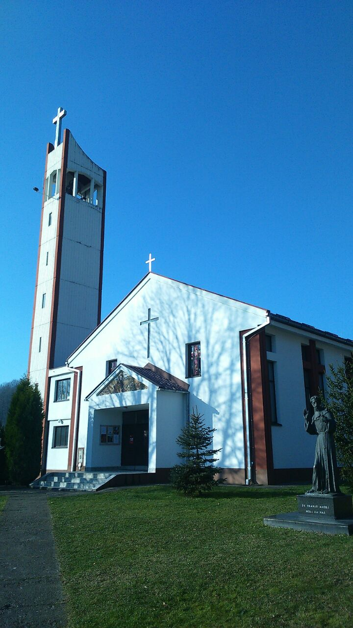 Šikara Croatian-Catholic-Crkva/Kirche/Church